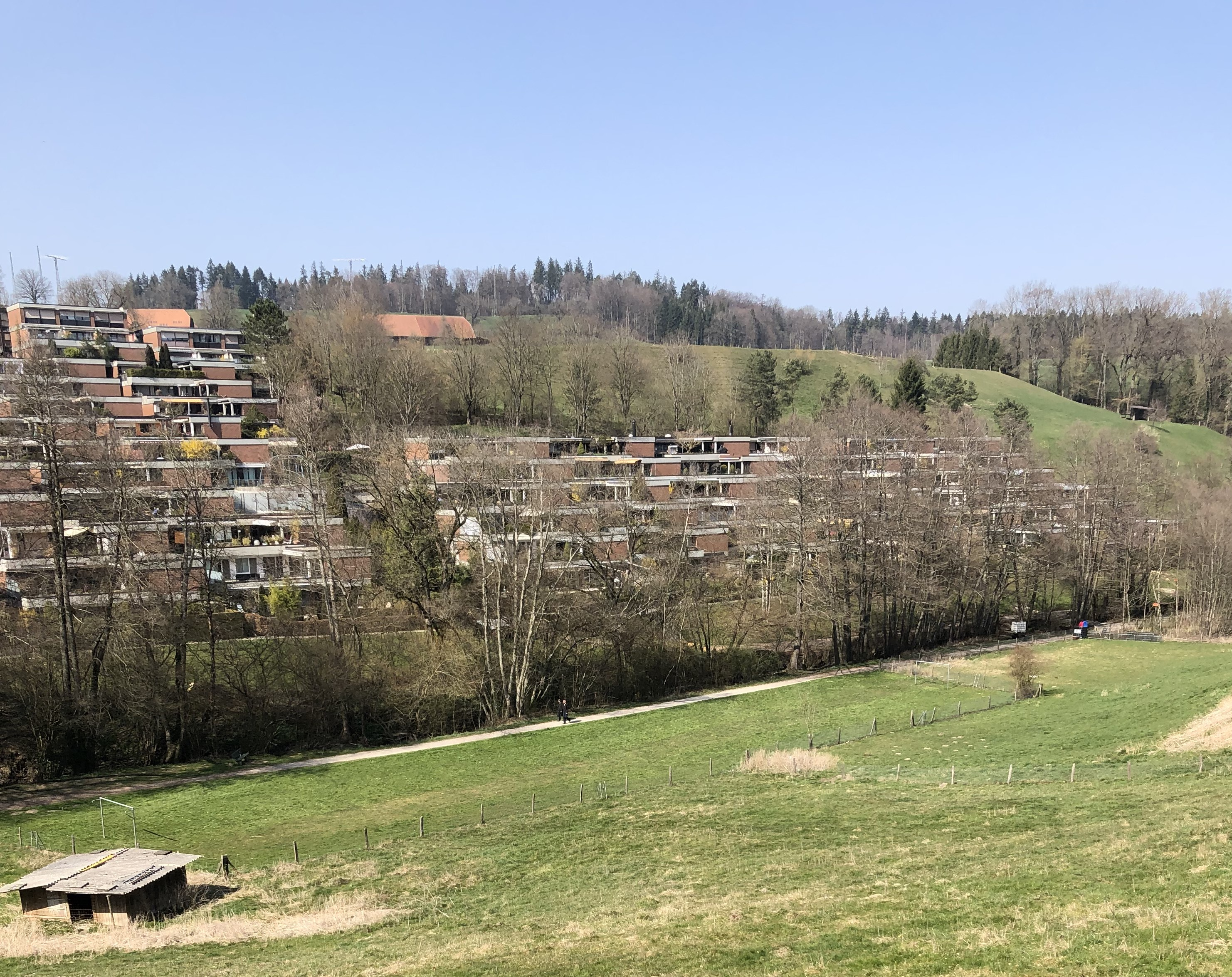 Blick von Gäbelbach auf das Riedernrain-Quartier 2